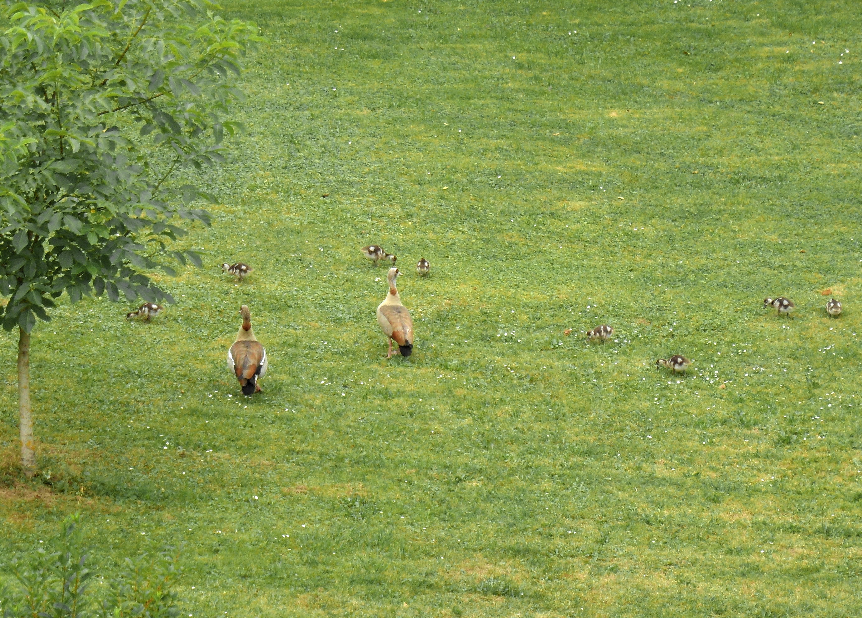 Nilgänse am Leineufer